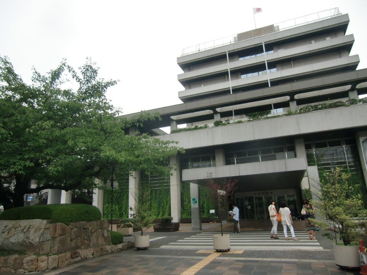 西宮市役所を東側より撮影